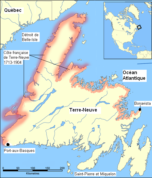 Représentation des droits de pêche sur la côte française de Terre-Neuve de 1713 à 1904.